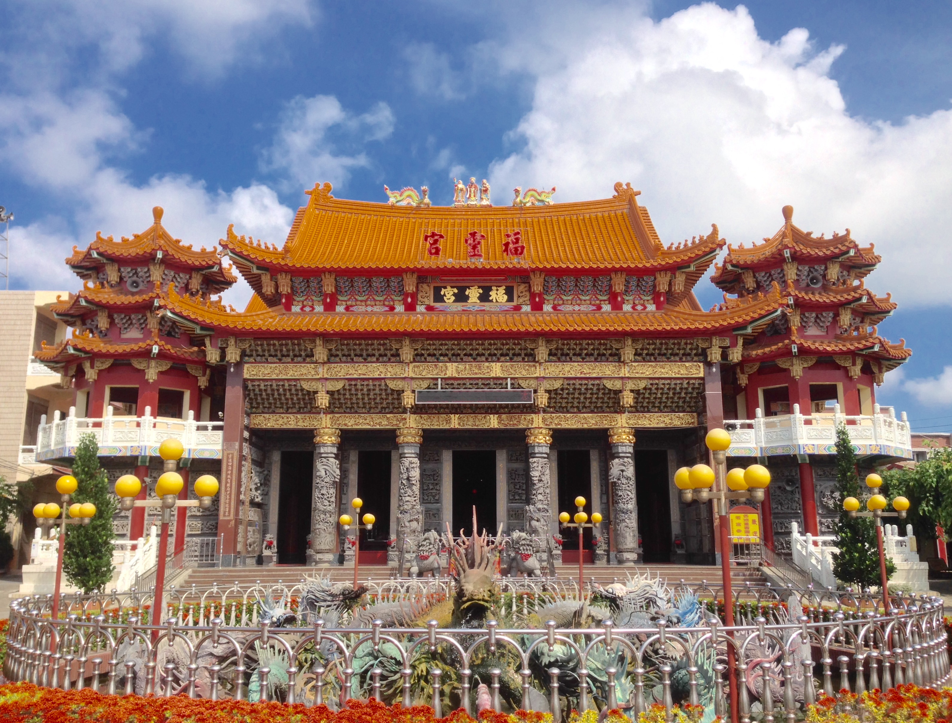 中文（台灣）: 東石鄉福靈宮